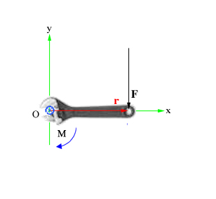 Момент силы в случае гаечного ключа